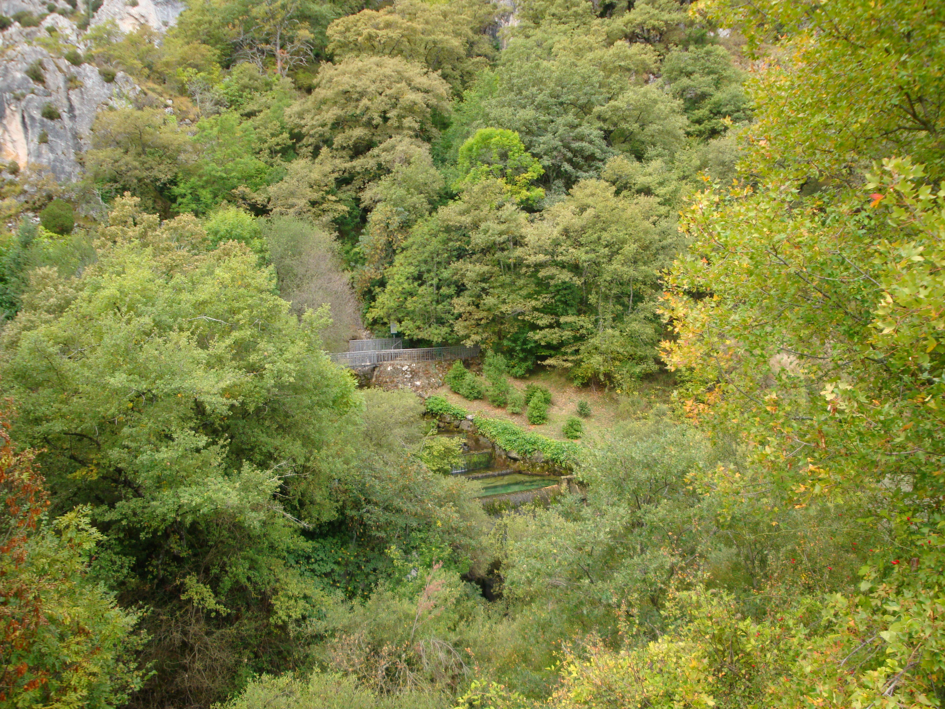 Arteta, Nafarroa